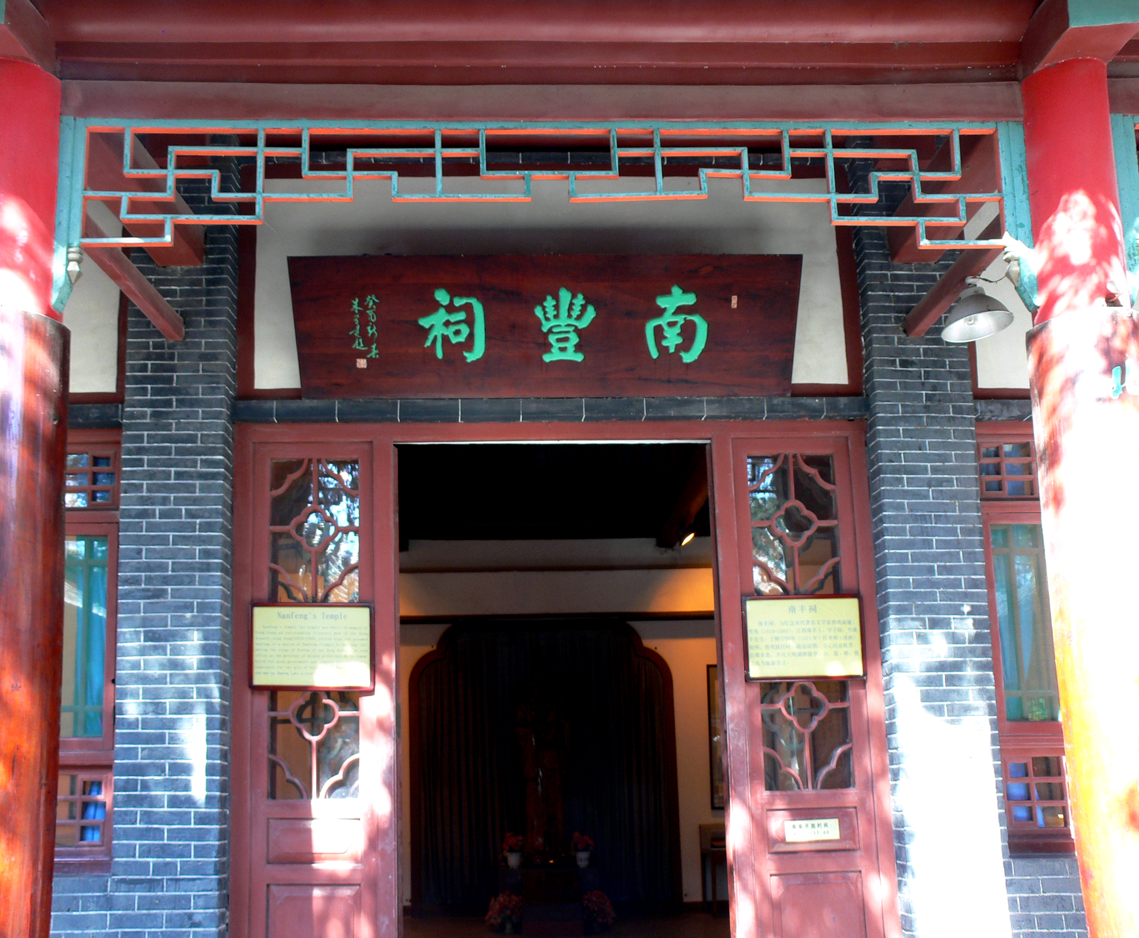 济南大明湖公园南丰祠